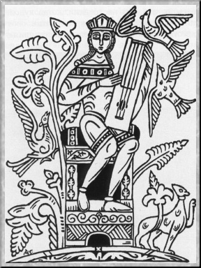 Дмитрий Стеллецкий. «Гусляр». Иллюстрация для журнала "Аполлон". 1911